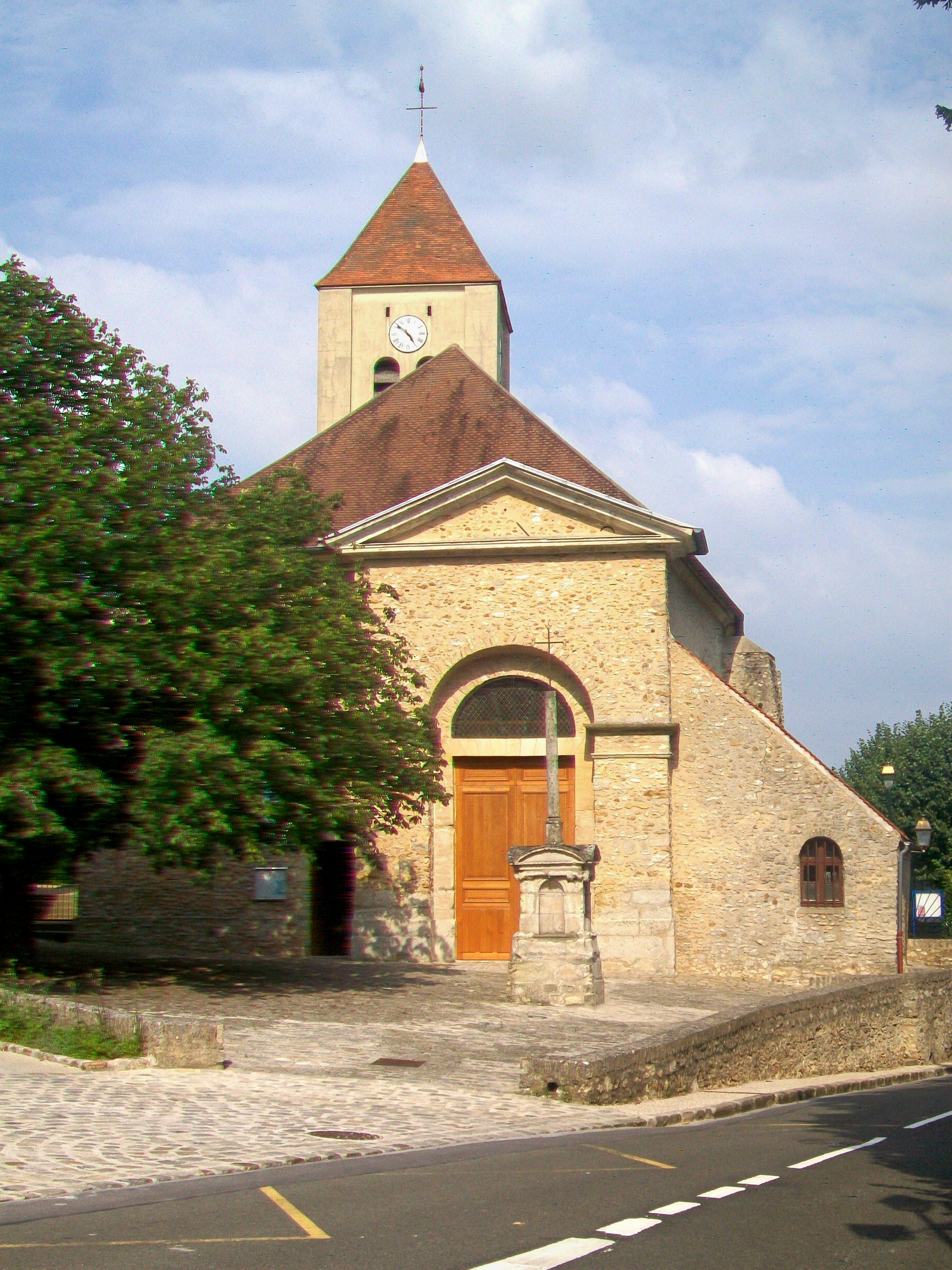 Église Saint-Sulpice, façade occidentale et calvaire.